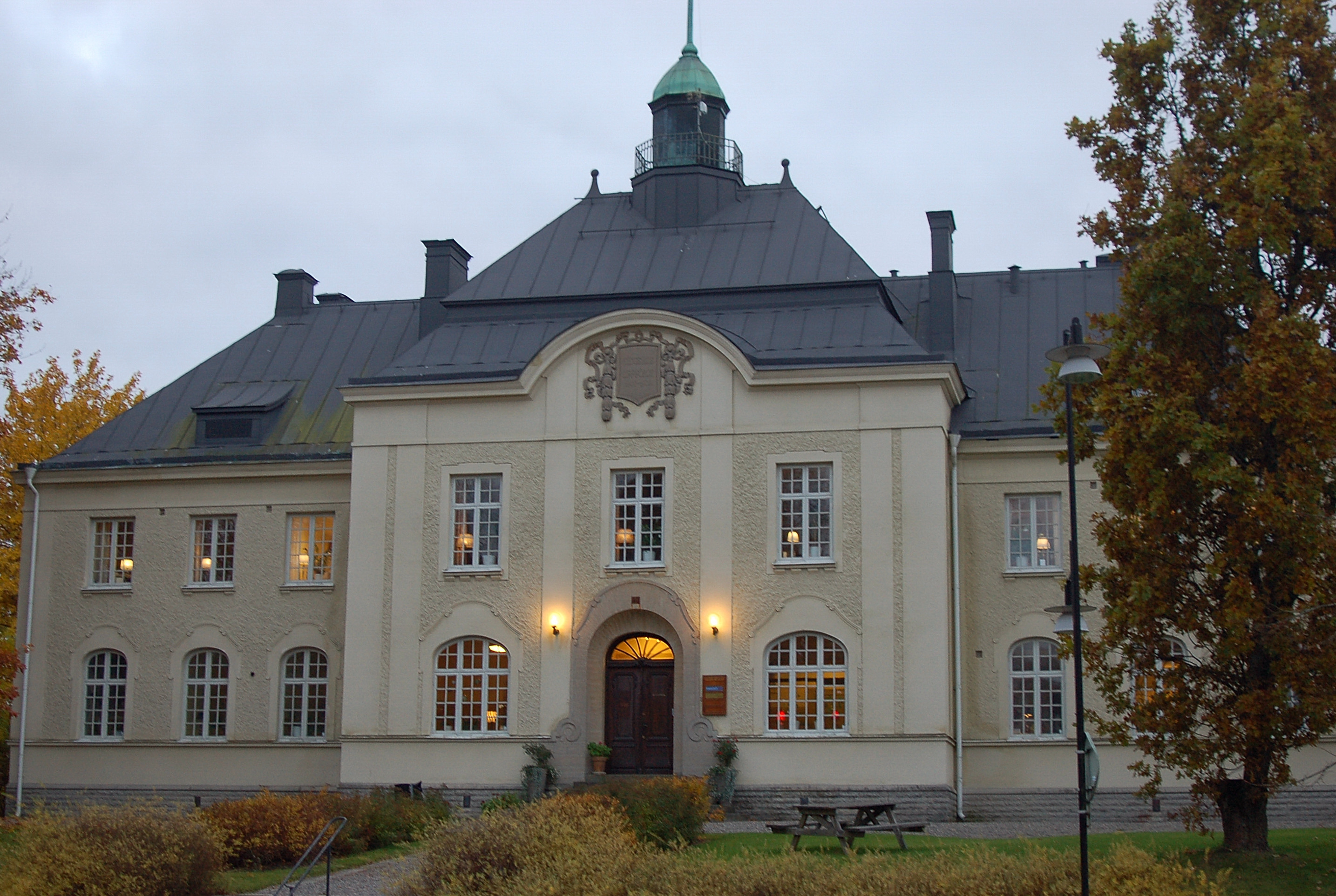 Före detta tingshuset i Hallsberg.